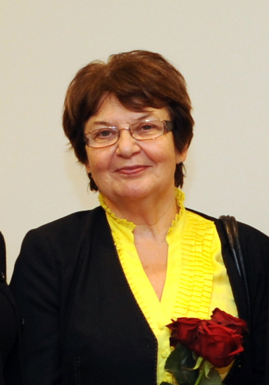 Helene Vannari välisministeeriumi kultuuripreemia üleandmisel